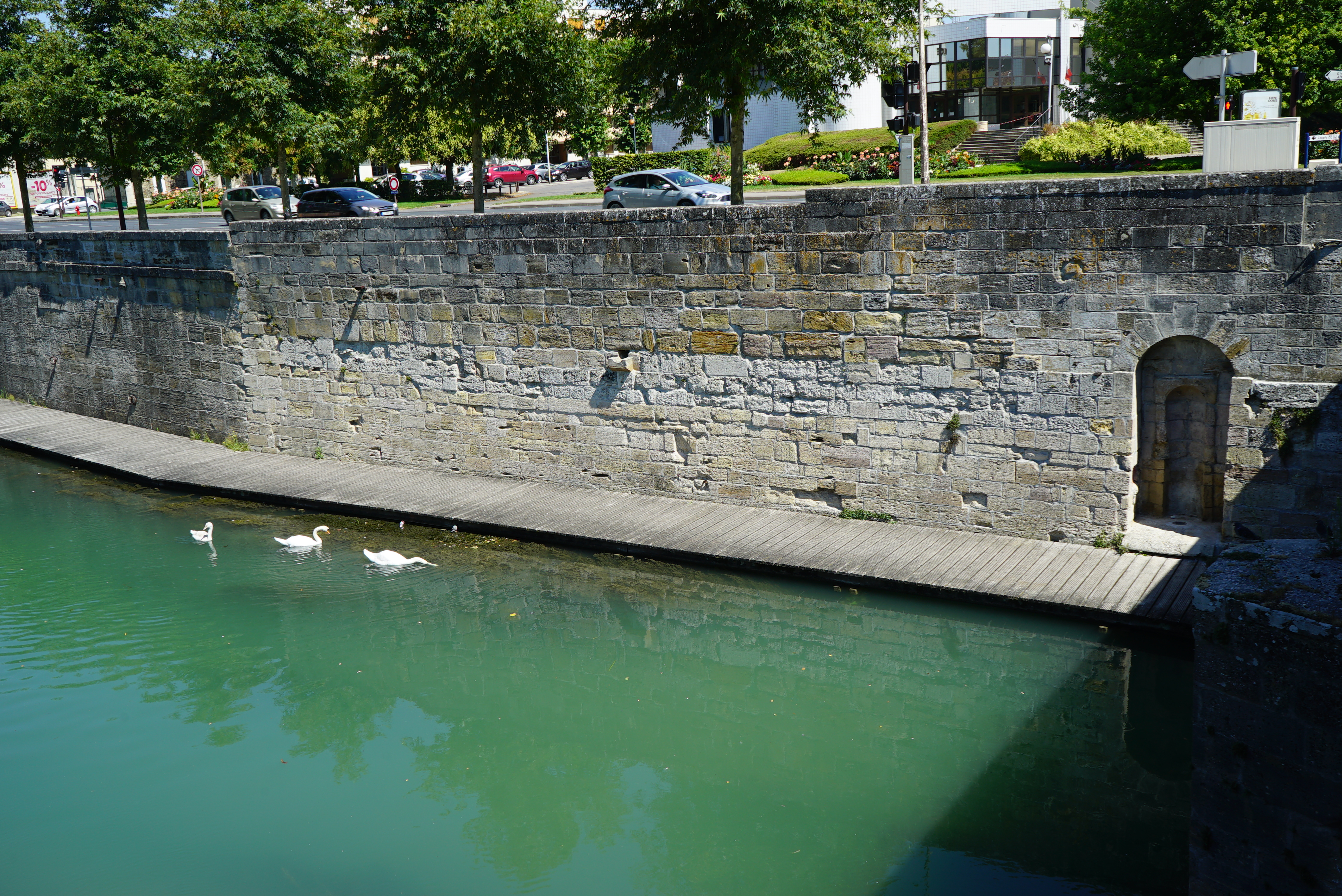 côté nord-est du pont des mariniers sur le Mau (Châlons-en-Champagne).